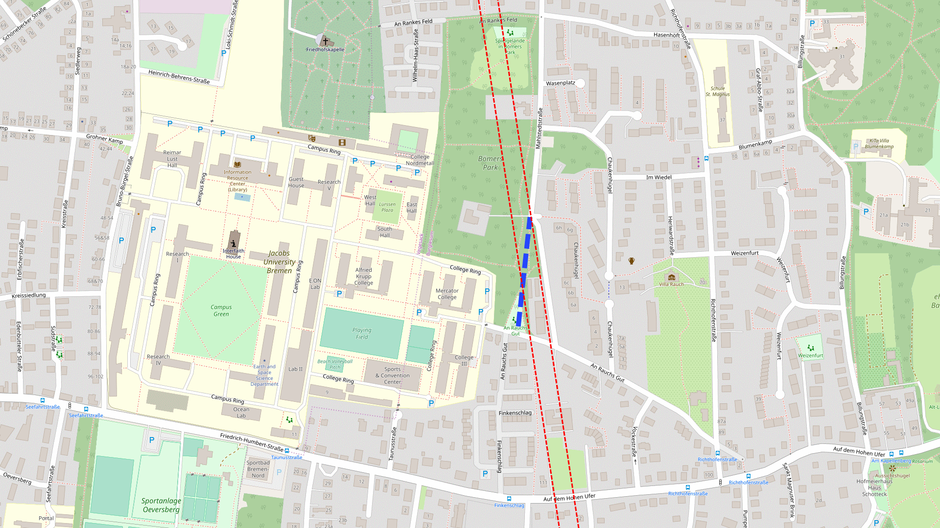 Ehemaliger südlicher Abschnitt der "Mahlstedtraße" (blau) und geplanter Verlauf der Werderlandtrasse (rot)